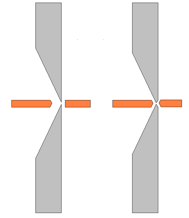 Skizze Schneide mit und ohne Wate